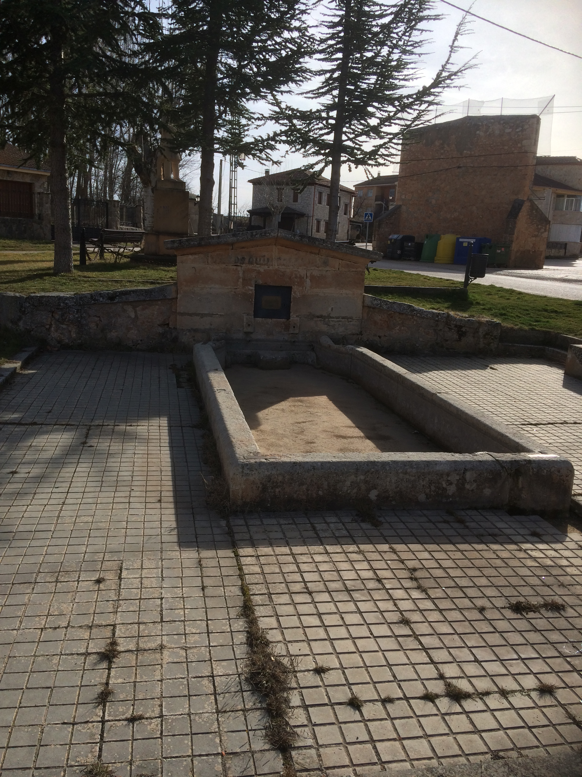 Pilón Aldehorno (Segovia) 2017